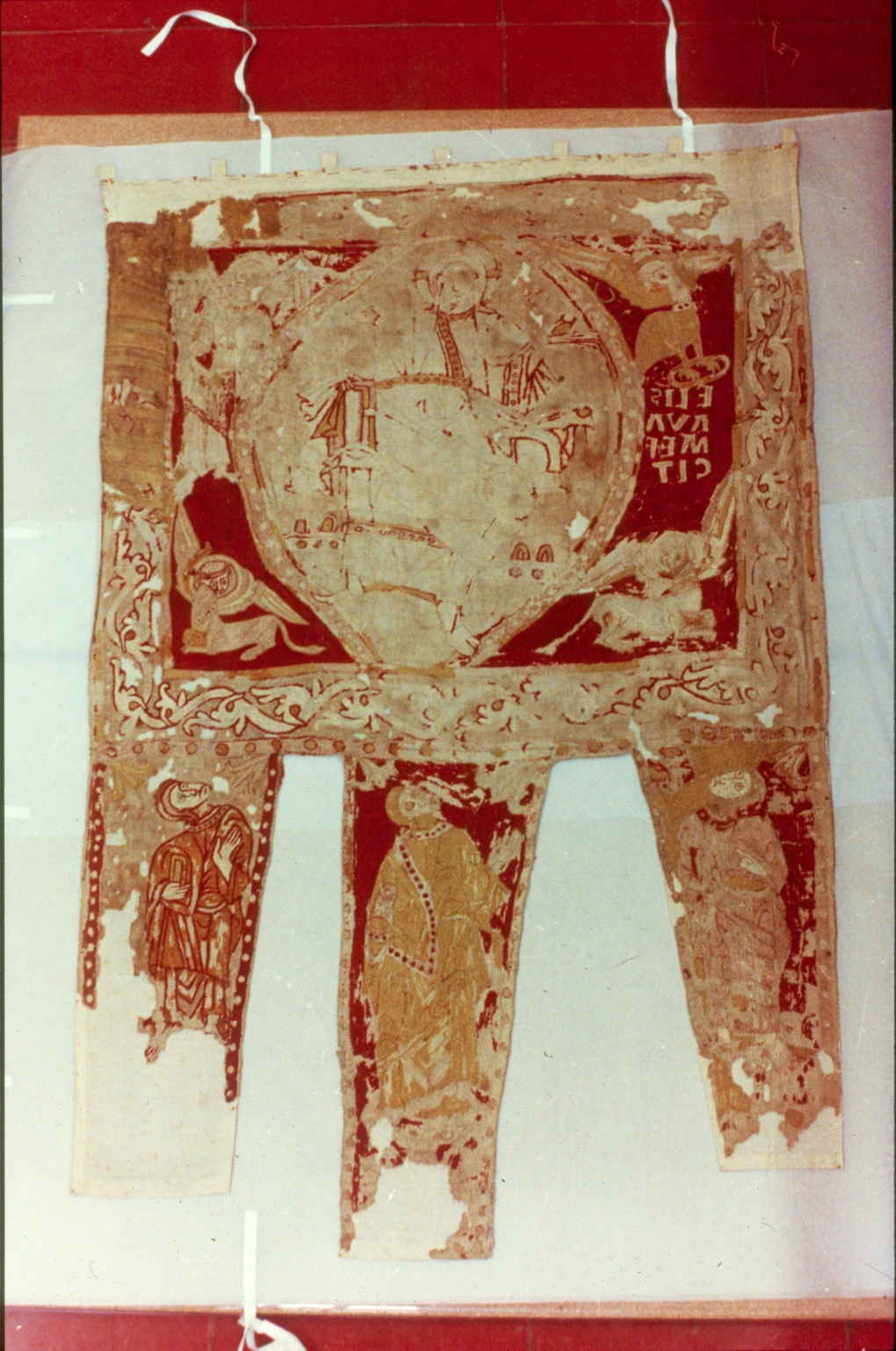 Penó de Sant Ot